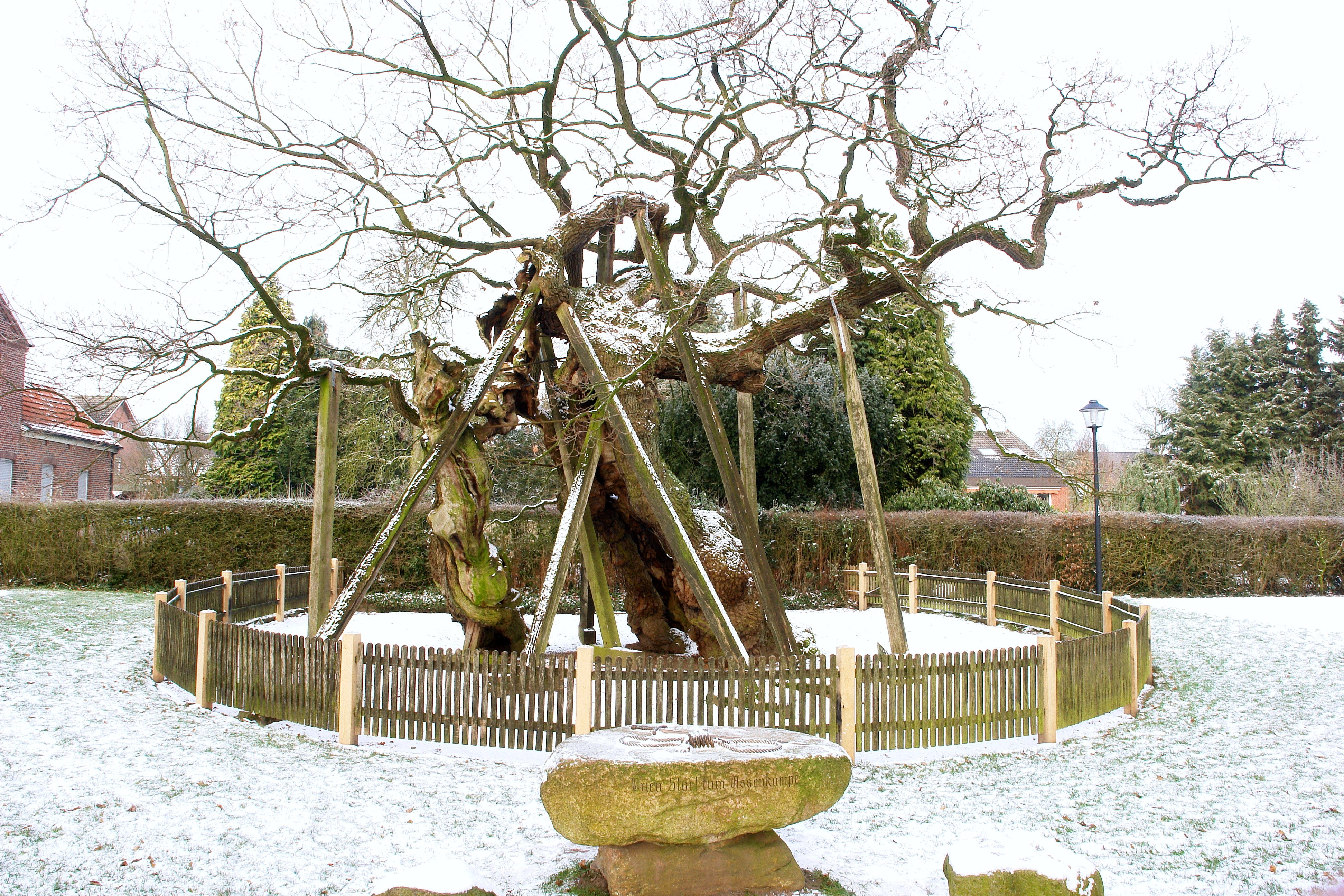 Femeiche bei Erle